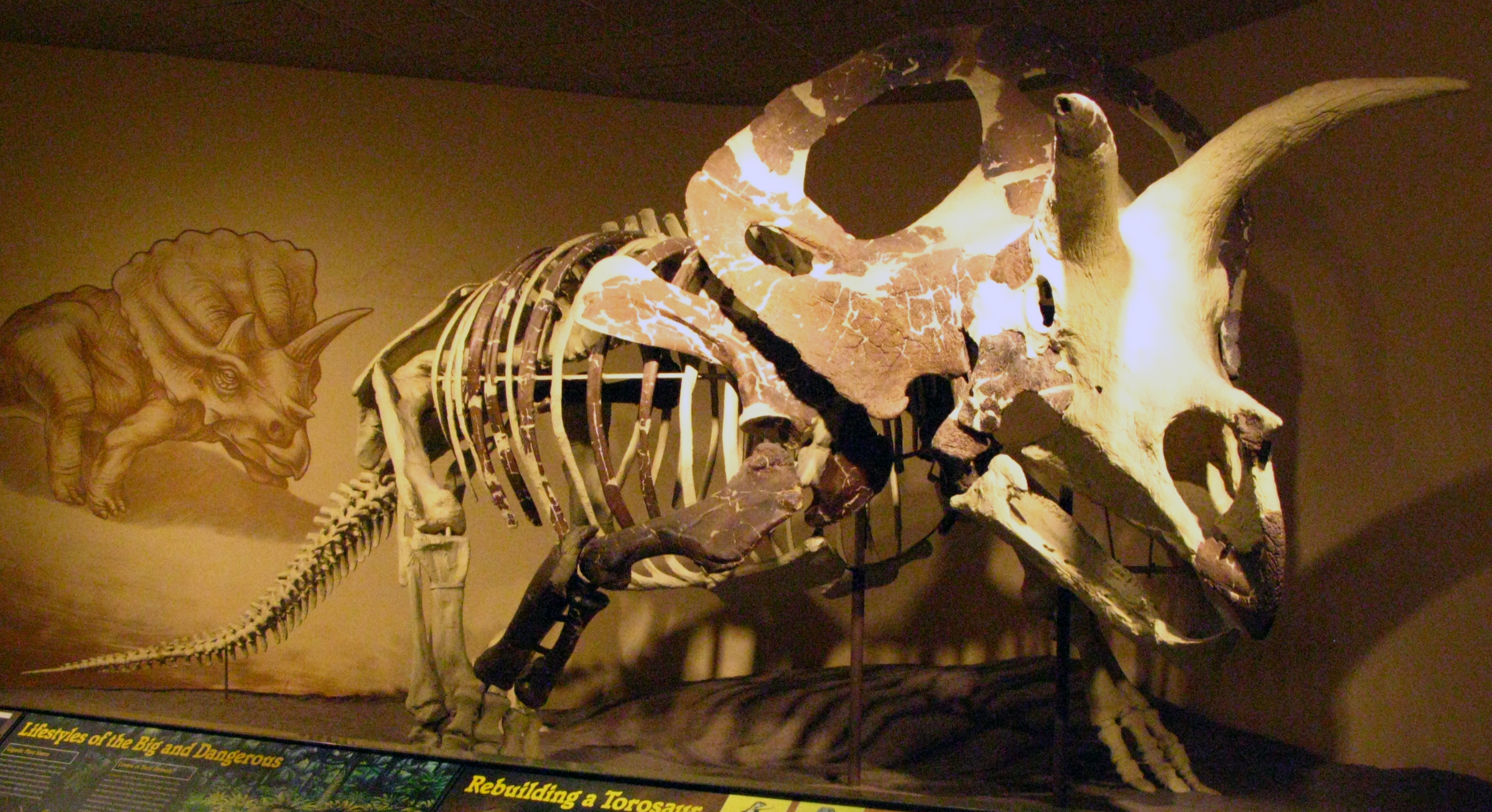 Torosaurus (MPM VP6841) in Milwaukee.